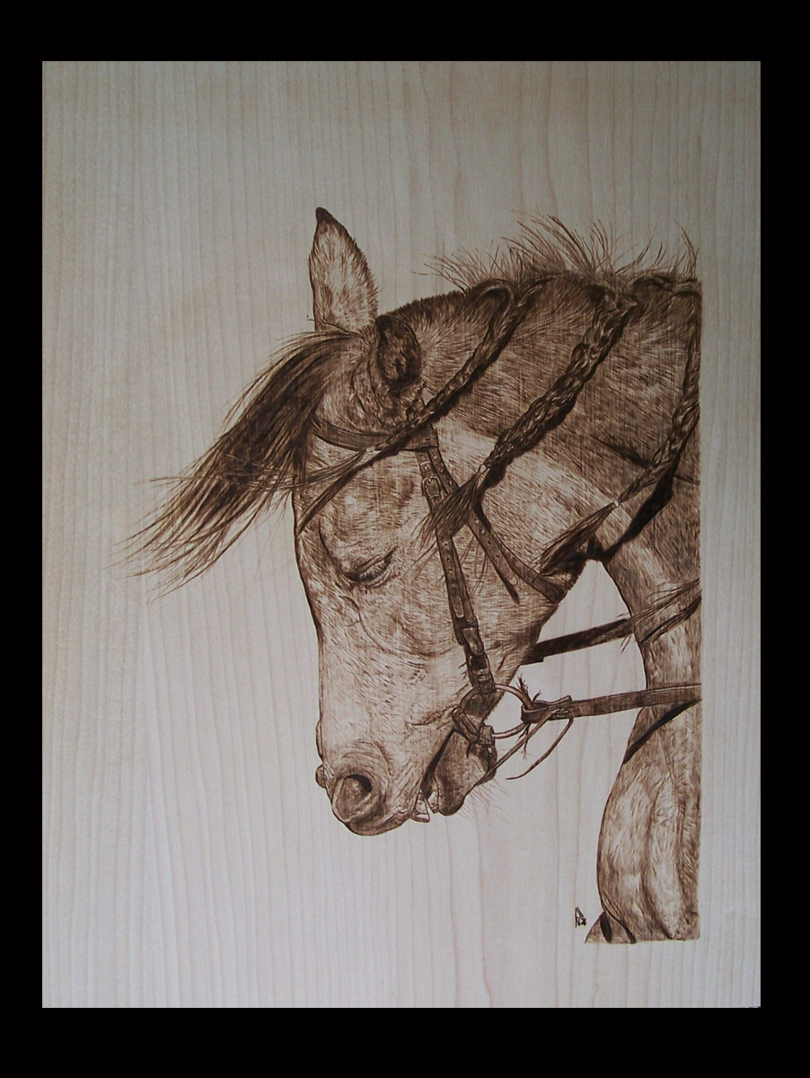 realizzato su pioppo